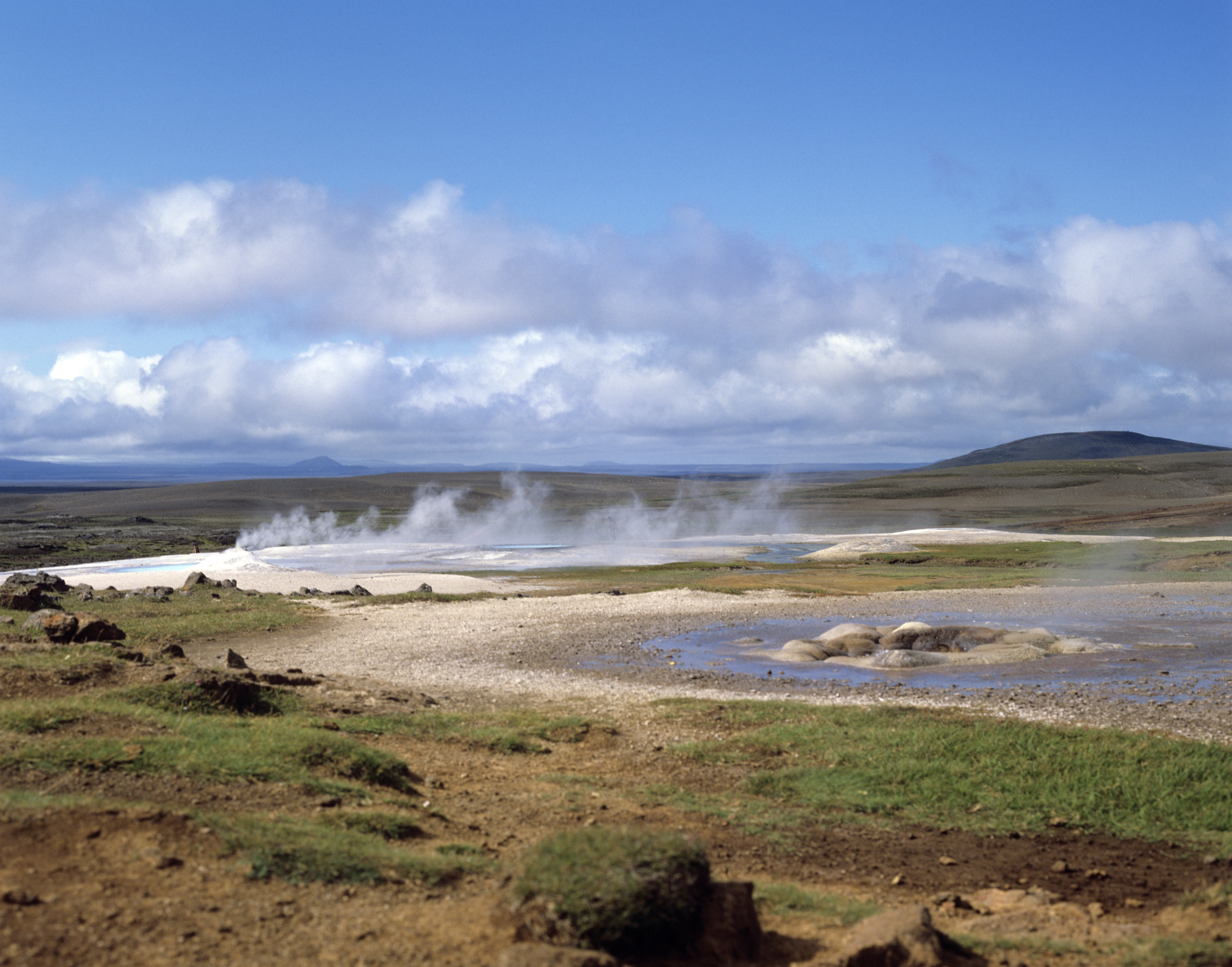 Thermalgebiet in Hveravellir.